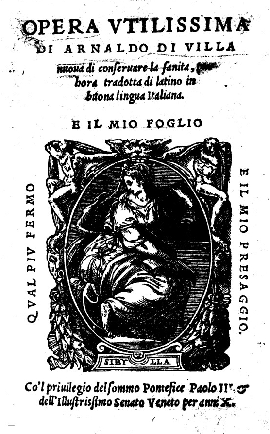 Arnaldo de Villa Nuova, Opera utilissima (Italian, 1549) title page